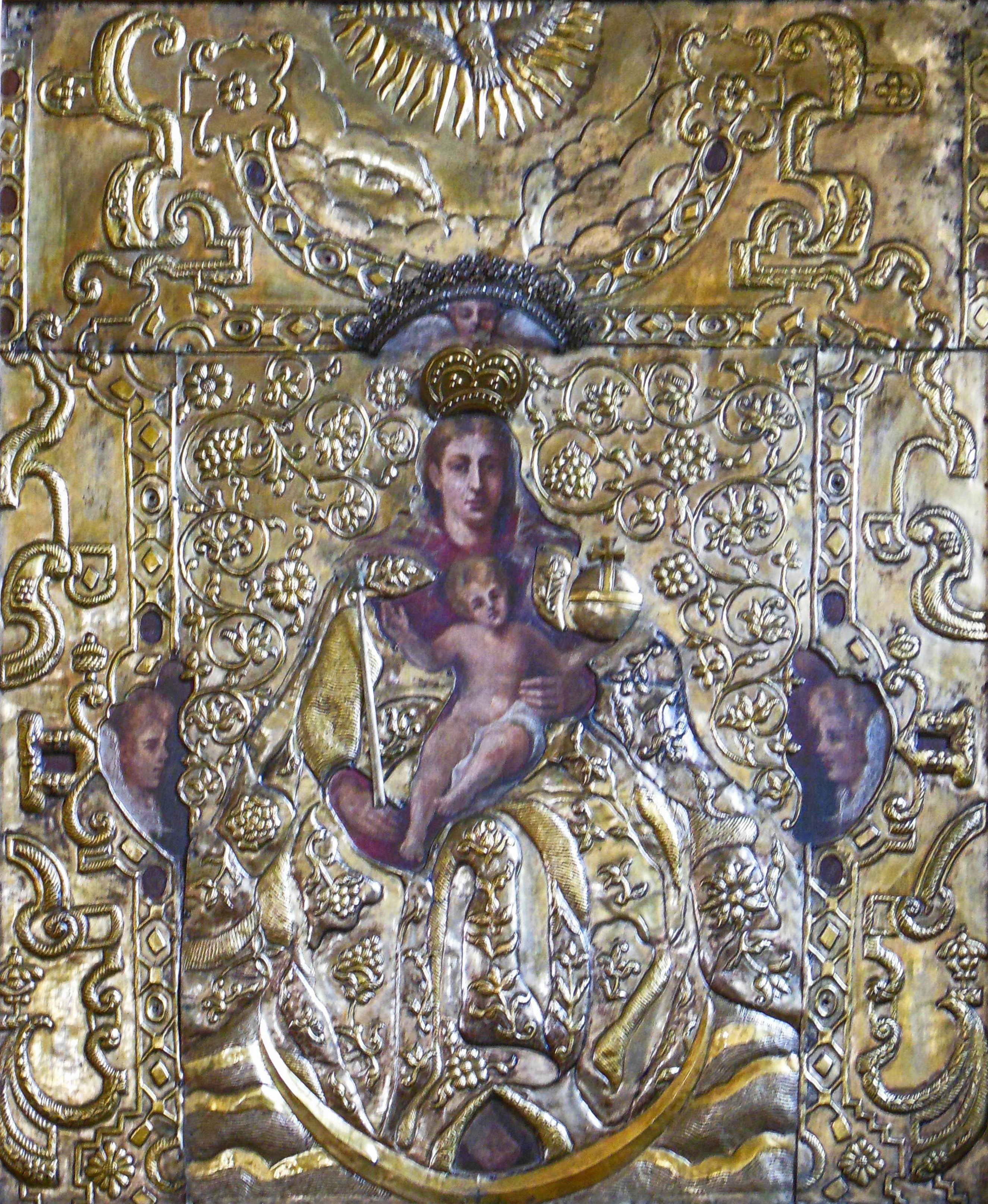 Беларуская (тарашкевіца): Комплекс касьцёла Сьв. Ганны. в. Лунна This is a photo of Belarusian heritage monument. Reference number: 413Г000376 ( WLM)